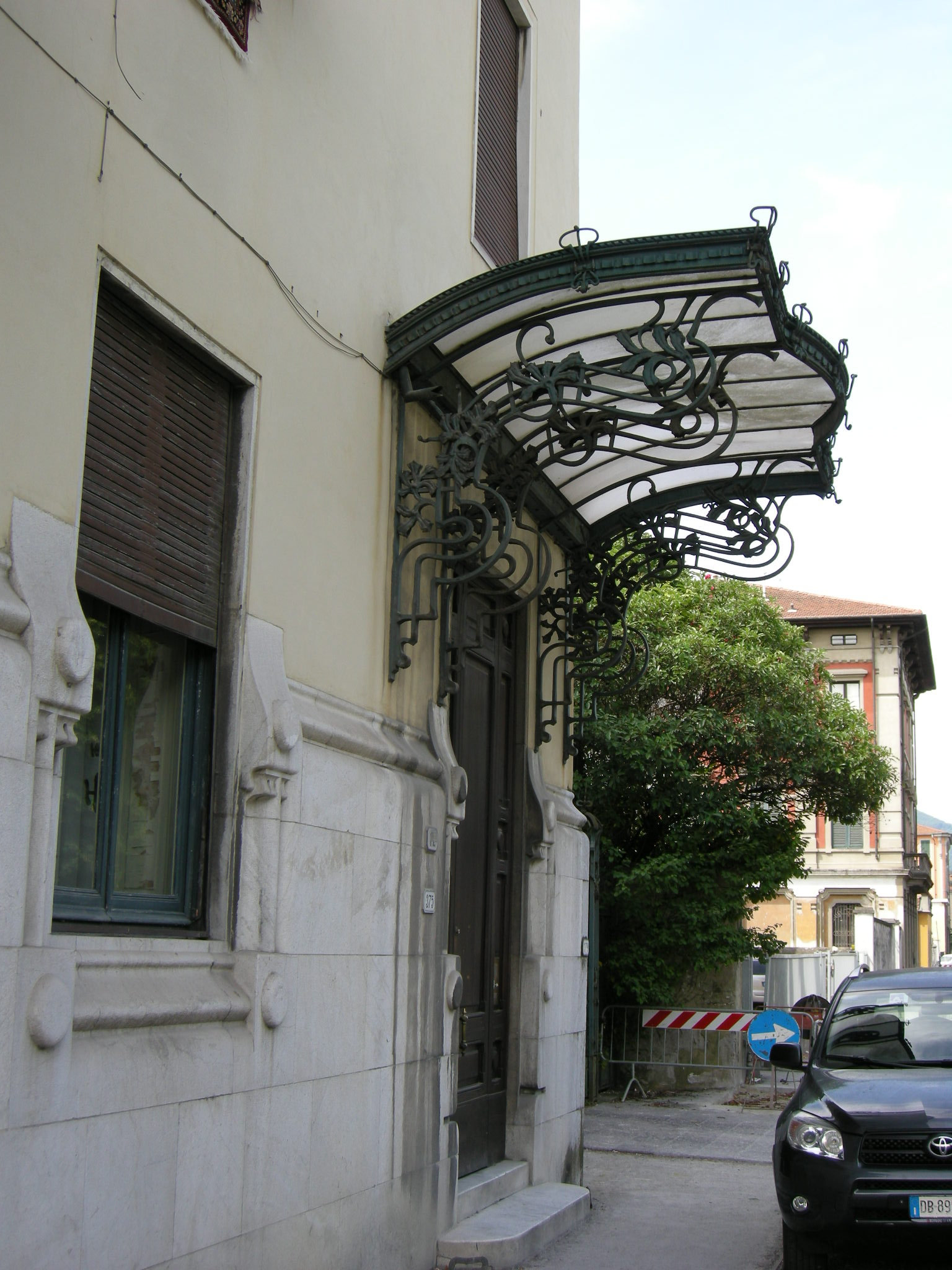 Villa Simonetti or Villa Simonini. Lucca, Tuscany.